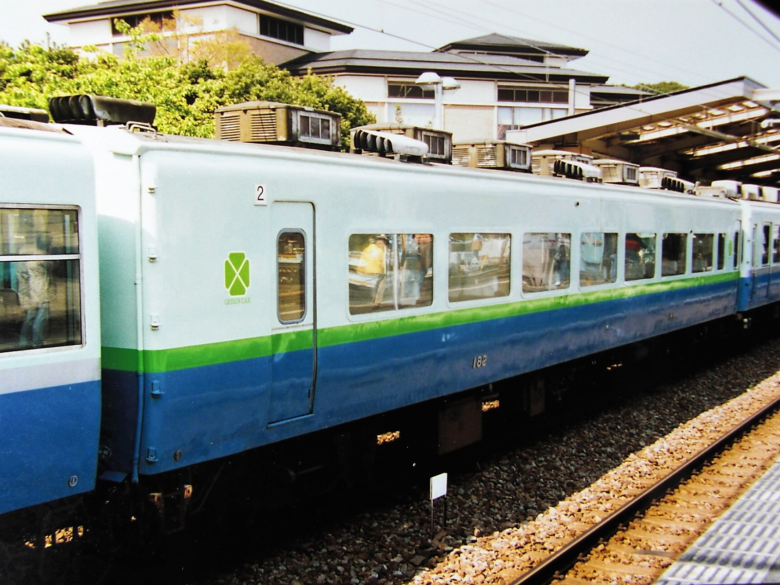 伊豆急行電鉄100系サロ182